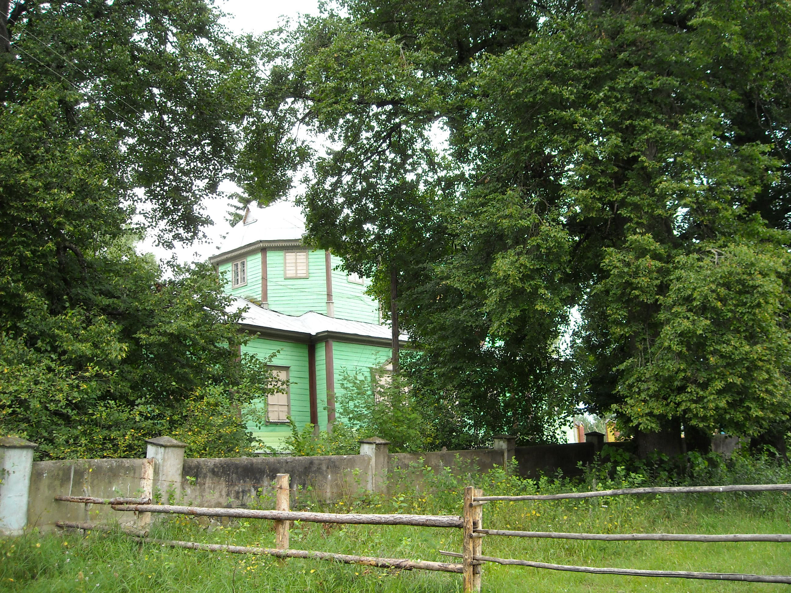 Беларуская (тарашкевіца): Казьмадзям’янаўская царква. в. Гарадок This is a photo of Belarusian heritage monument. Reference number: 513Г000408 ( WLM)